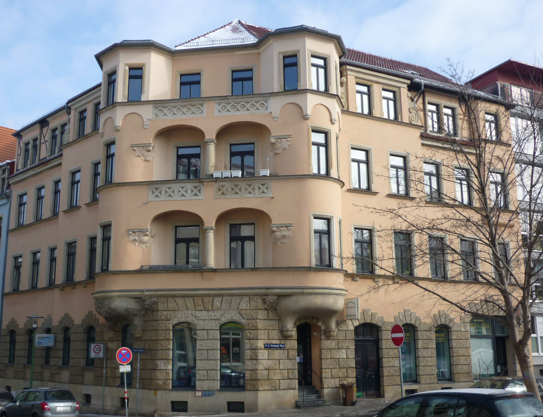 F.C.-Weißkopf-Platz 2 in Dresden-Plauen